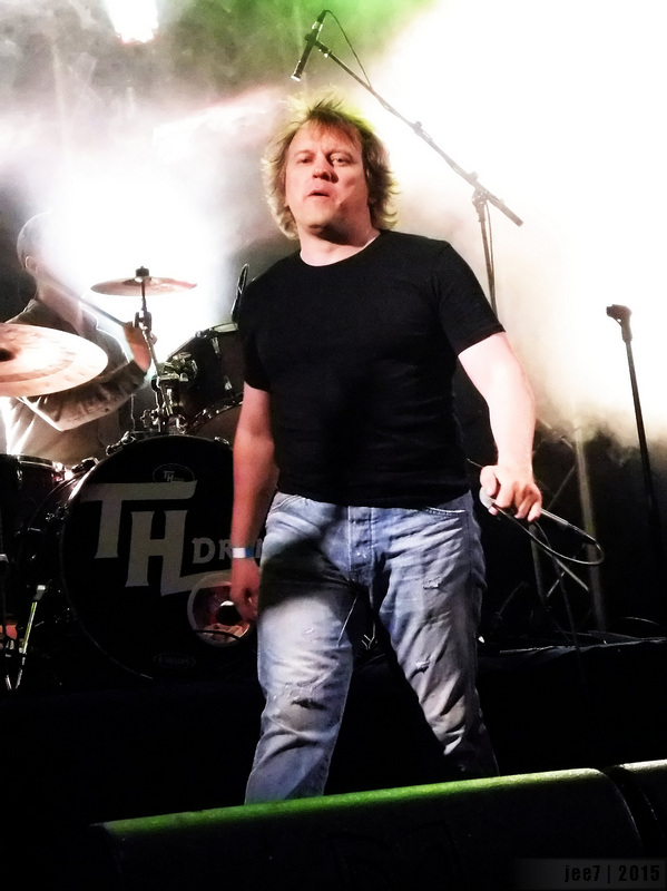 Venno Loosaar esineb muusikafestivalil Amme Rock 2015 ansambliga Cookies